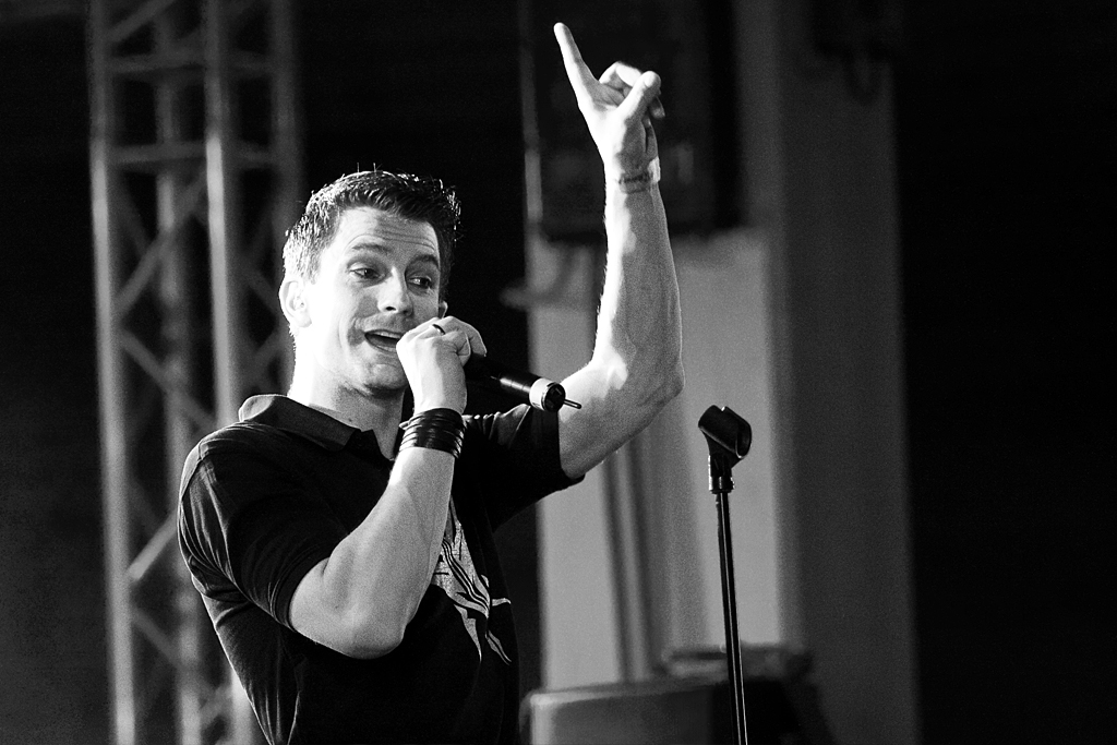 Aufnahme von Frozen Plasma auf dem Amphi Festival 2013 in Köln, Deutschland